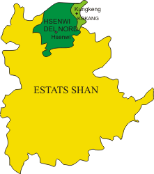 Mapa de situació del estat de Kokang, imatge propia